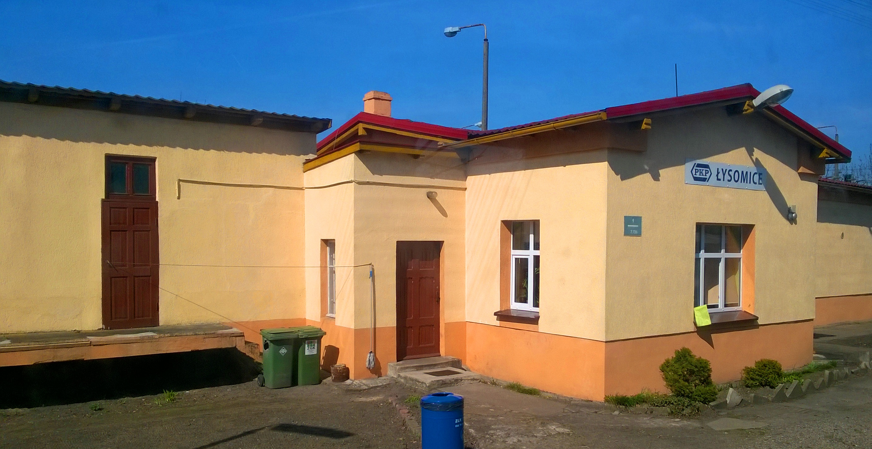 Przystanek osobowy Łysomice